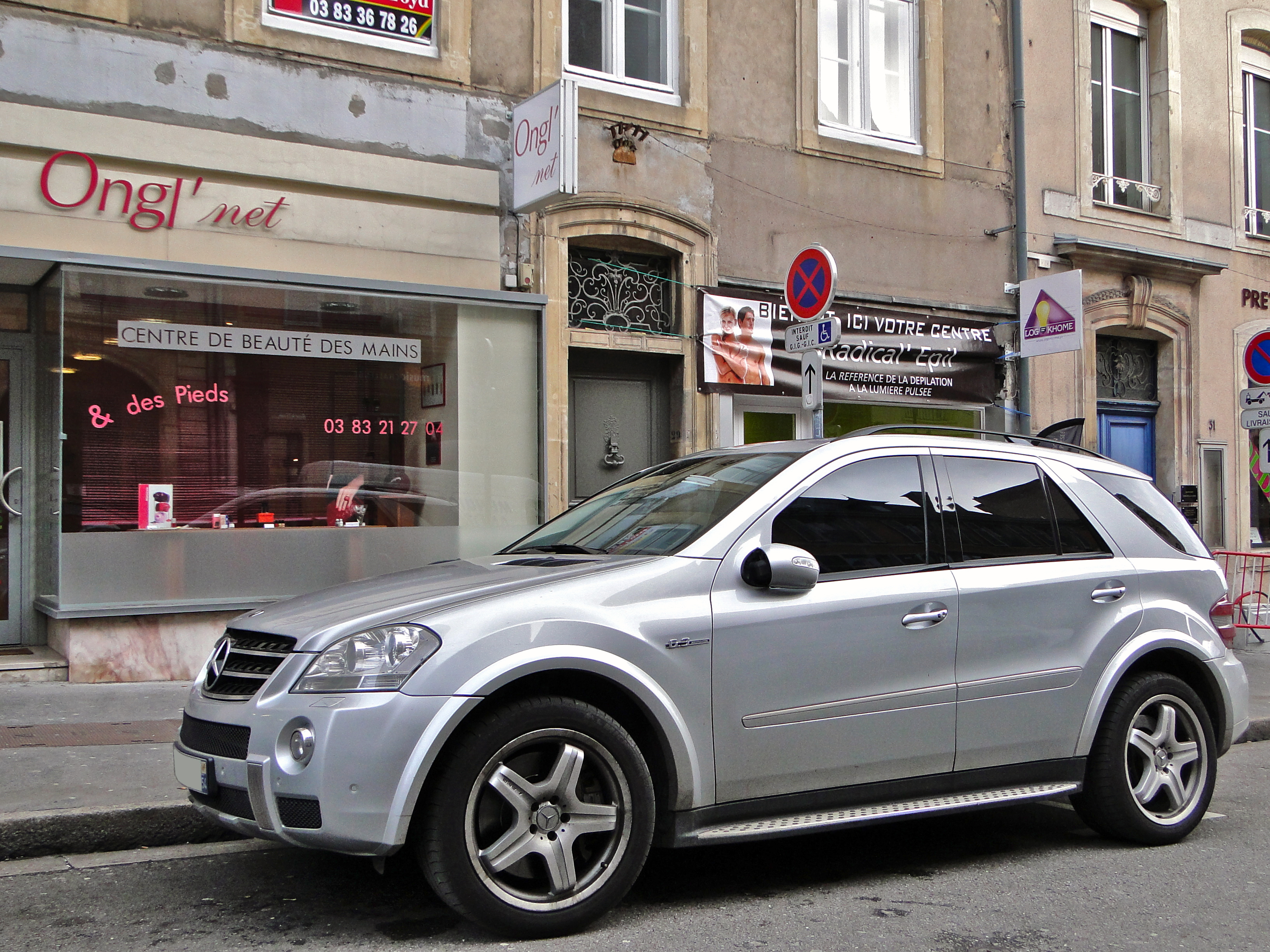 Mercedes-Benz ML63 AMG